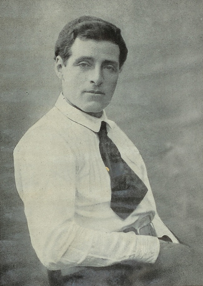 Joseph Trumpeldor in 1917